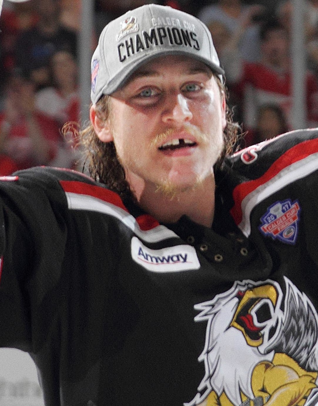 2017_bertuzzi (2)